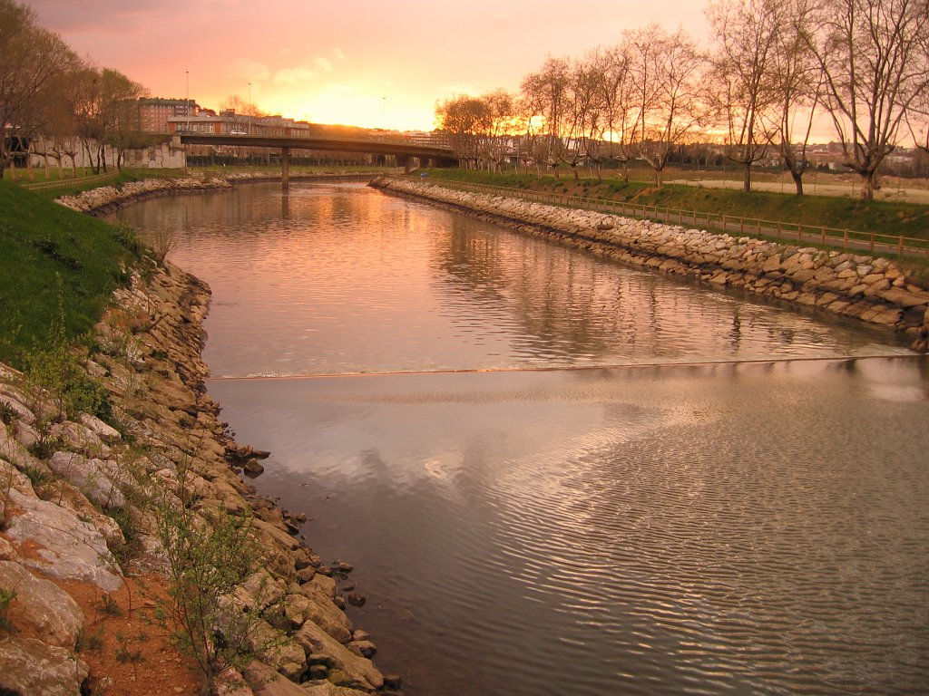 Ría de Avilés la atardecer